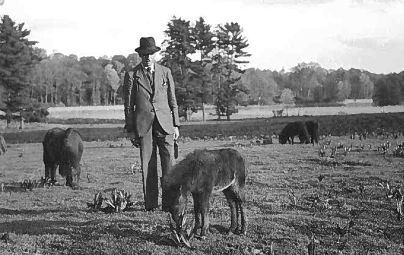 Photo prise dans le domaine du château du Vivier, à Fontenay-Trésigny (Seine-et-Marne) par mon grand-père au début des années 1930 : le vicomte de Perthuis et son élevage de shetlands.